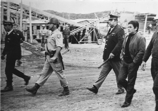 Rebelión de El Chocón